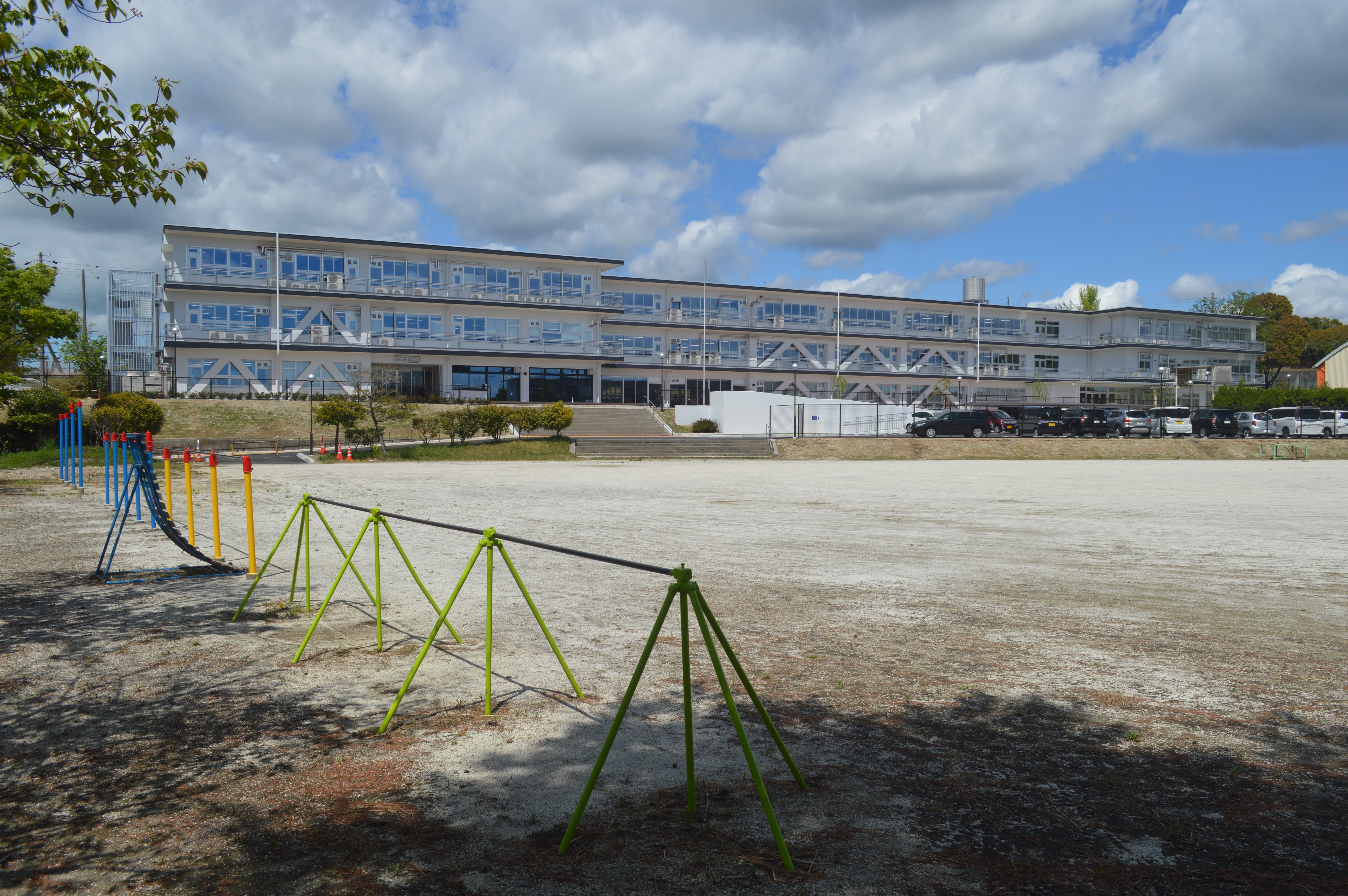 愛知県春日井市にある「グルッポふじとう」。